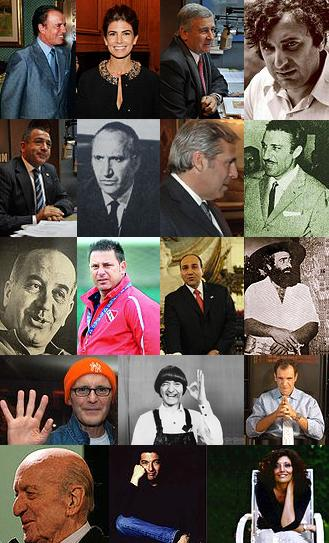 Algunos de los argentinos de ascendencia árabe más destacados. De izquierda a derecha y de arriba a abajo: Carlos Menem · Juliana Awada · Oscar Aguad · Juan José Saer · Luis Juez · Lorenzo Miguel · Jorge Sapag · Jorge Antonio · Felipe Sapag · Antonio Mohamed · Luis Manzur · Jorge Cafrune · Leonardo Favio · Carlos Balá · Daniel Hadad · Eduardo Falú · Ricardo Darín · Alicia Kozameh